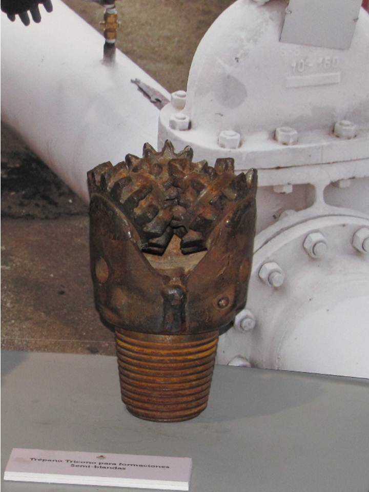 Museo Nacional del Petroleo, Comodoro Rivadavia